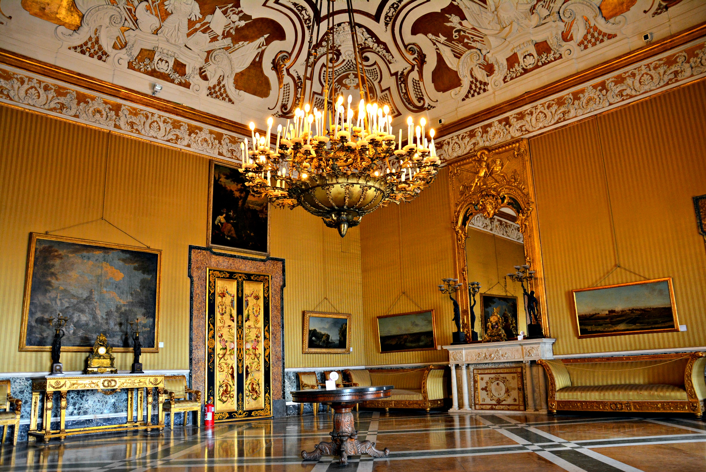 Vedi titolo